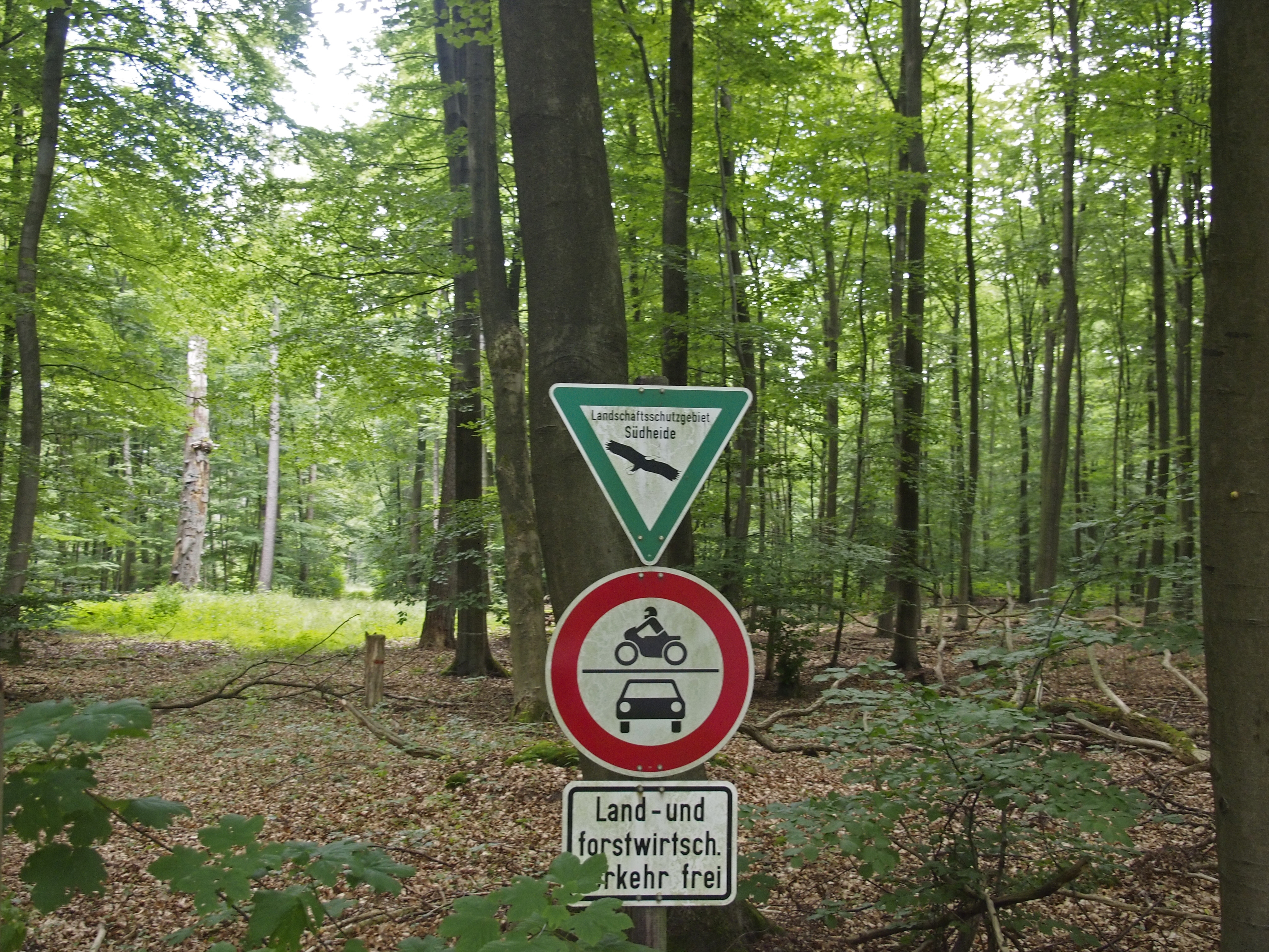 Der Lüßwald nahe Unterlüß (Deutschland), Teil des Landschaftsschutzgebietes „Südheide“ im Landkreis Celle (LSG CE 00025)